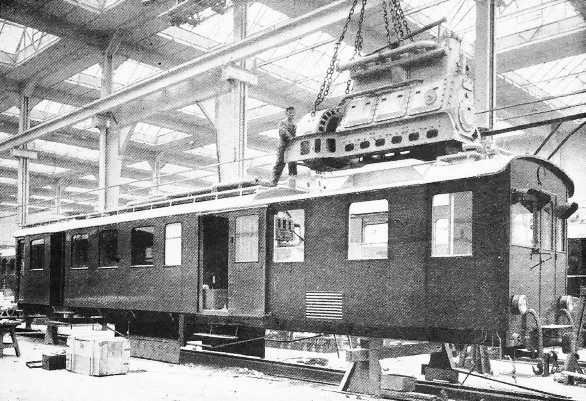 Einbau des Dieselmotors in den Triebwagen BCFm 2/4 der Appenzeller Bahn (AB)